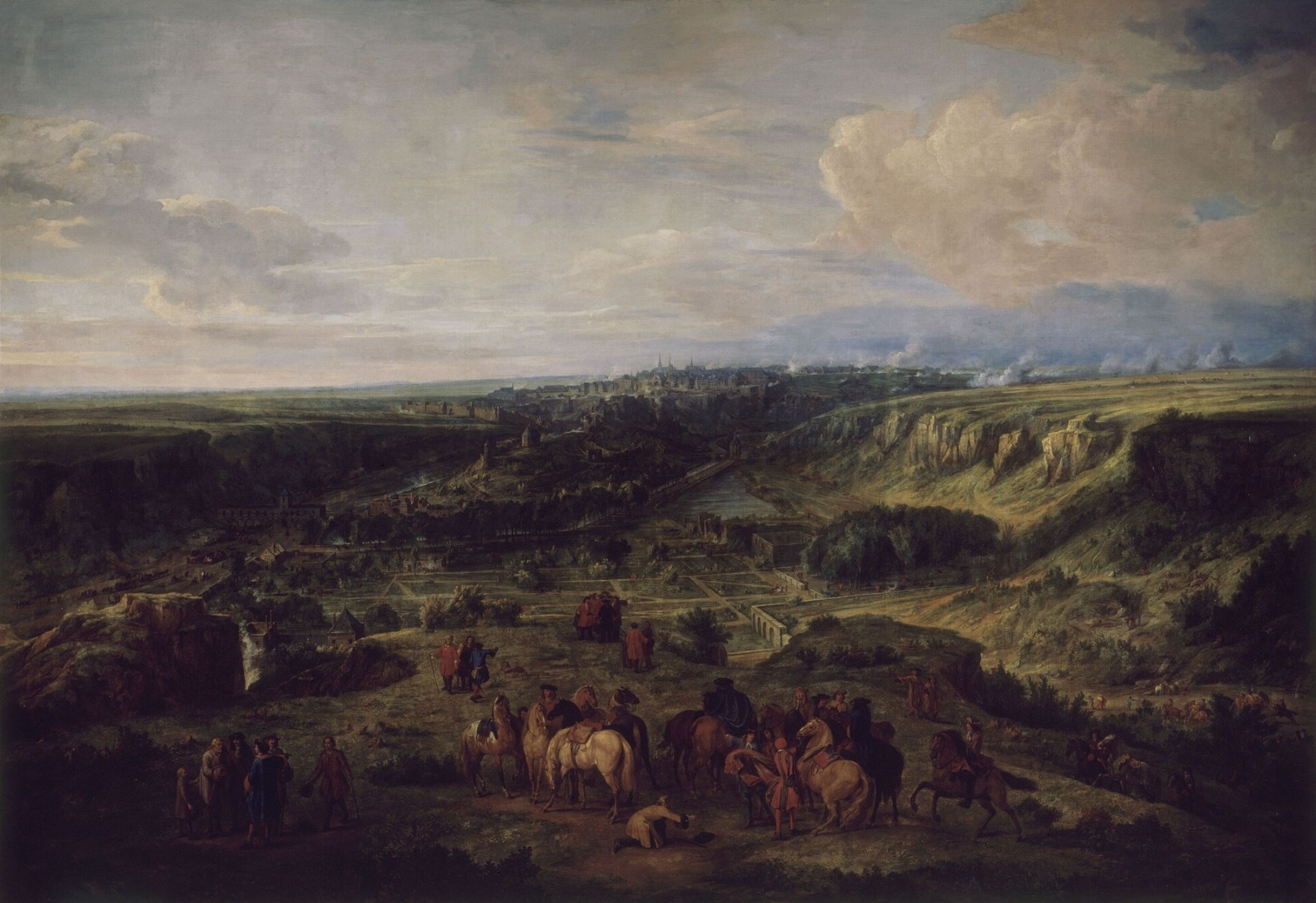 Prise de Luxembourg en 1684 par l'armée de Louis XIV dans le cadre de la politique d'annexion des années 1680. Copie d'un tableau de Adam François van der Meulen réalisé au moment du siège.